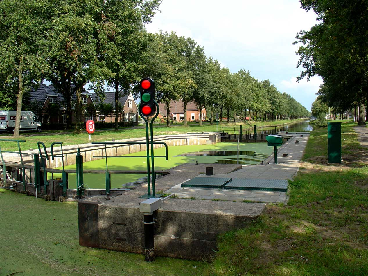 Achtste Verlaat in het Ter Apel-kanaal